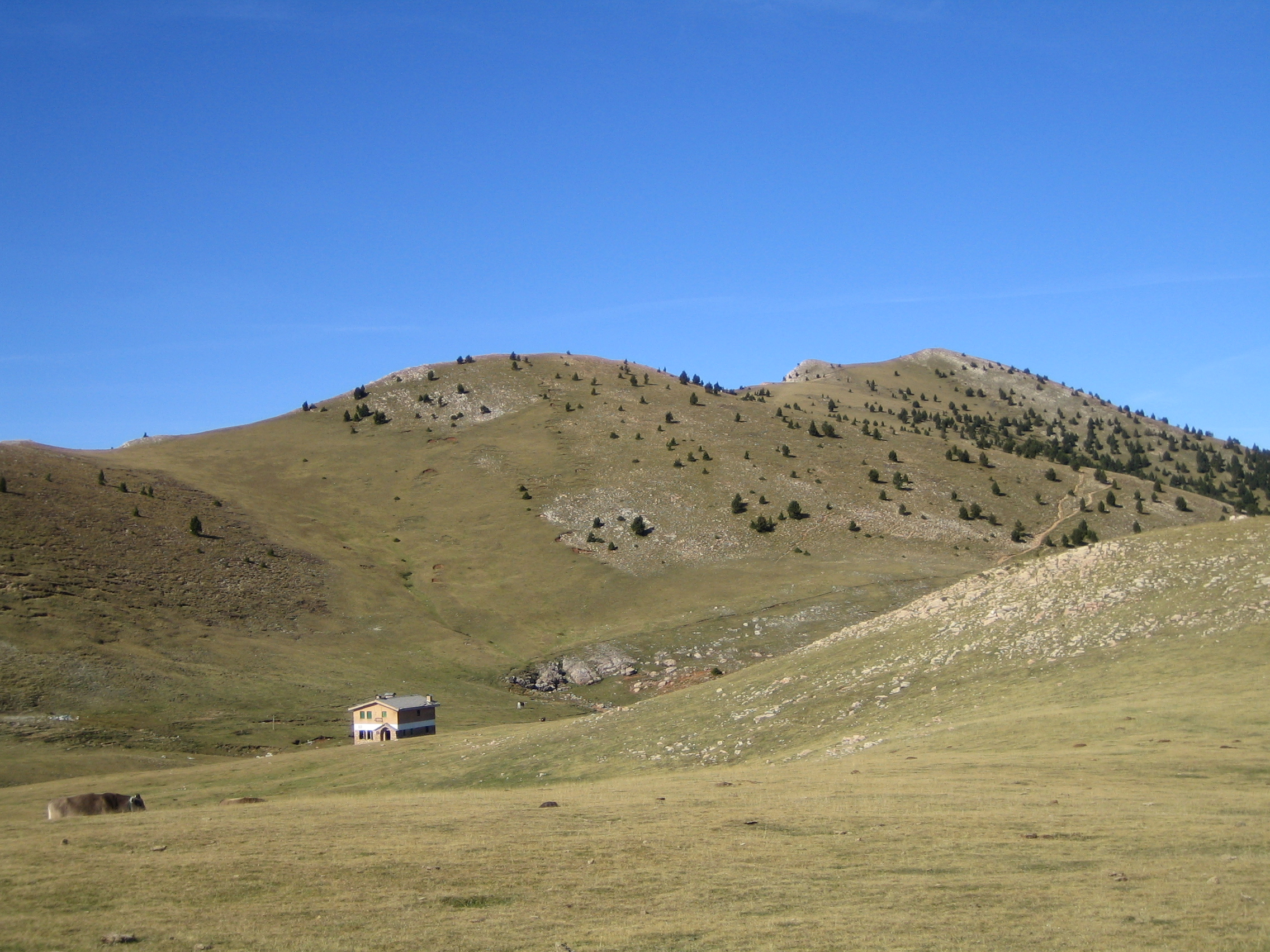 Cap de la Gallina Pelada al fons, amb el refugi Delgado Úbeda en primer pla.